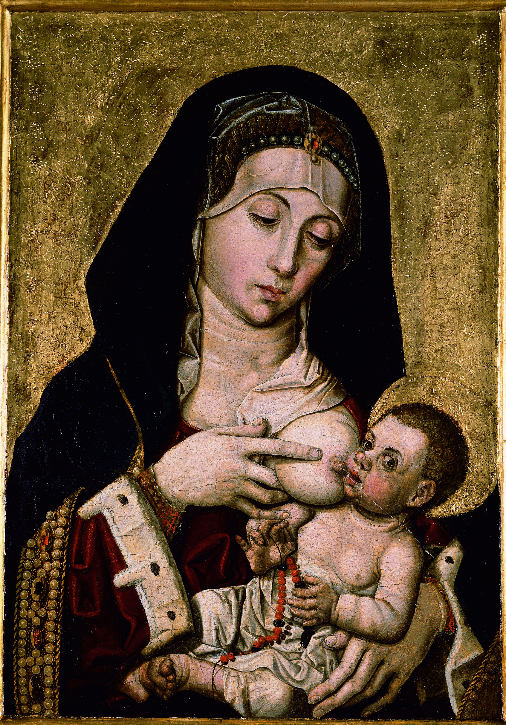 La obra representa a la Virgen María amamantando a su hijo, el Niño Jesús.